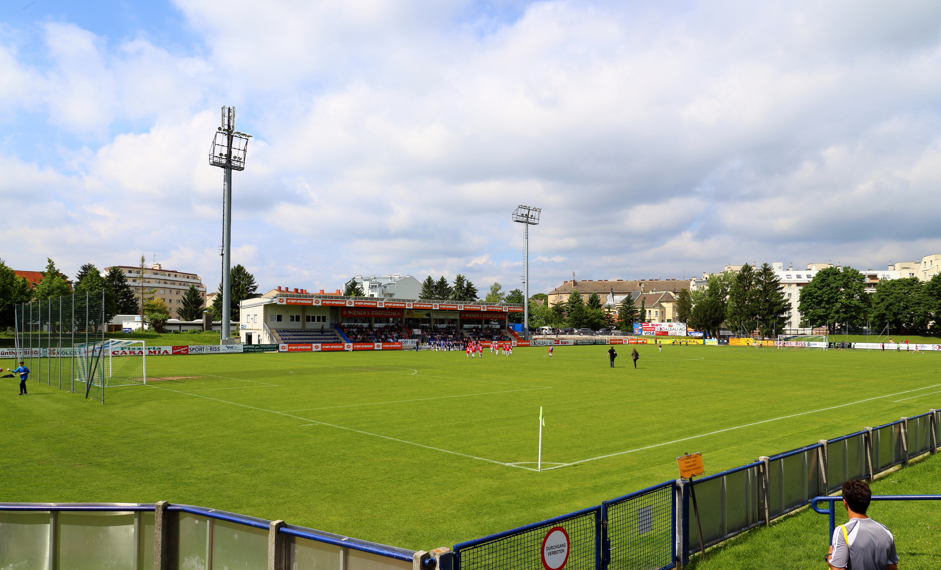 Der FAC-Platz an der Hopfengasse in Floridsdorf, ein Bezirksteil der österreichischen Bundeshauptstadt Wien. Die Sportanlage wurde 1933 eröffnet und war bis 1966 die Heimstätte des achtfachen österreichischen Meisters SK Admira Wien.